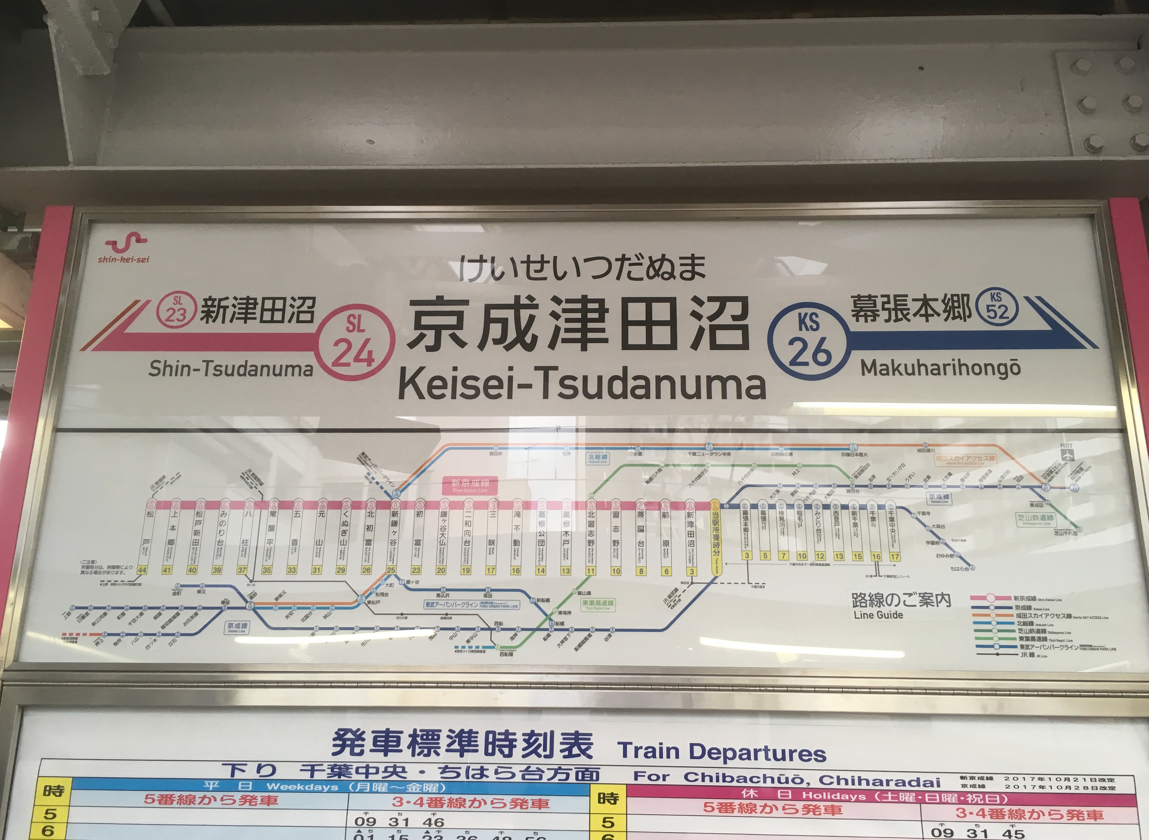 京成津田沼駅の駅名標